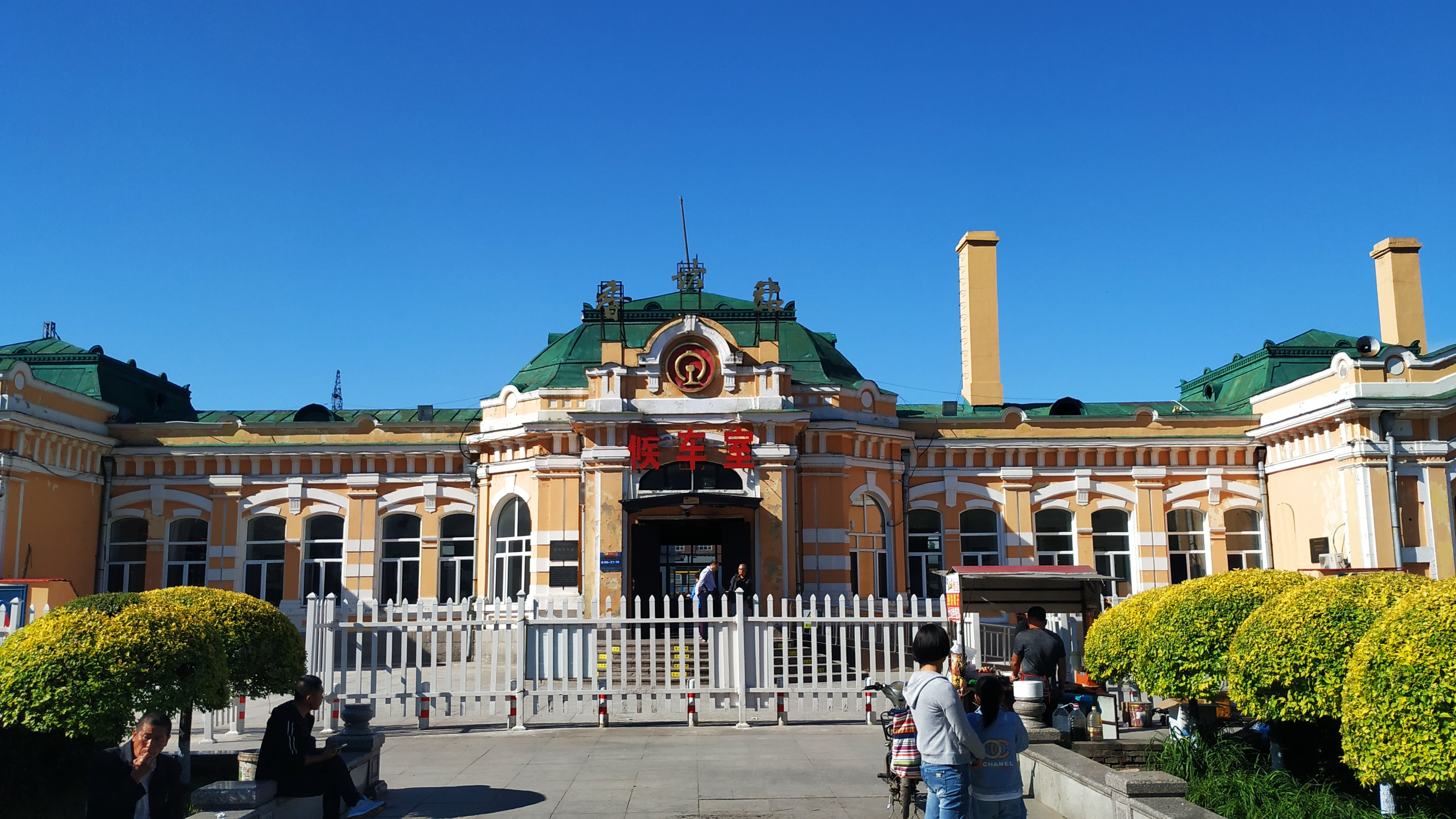 中文（中国大陆）: 哈尔滨香坊站